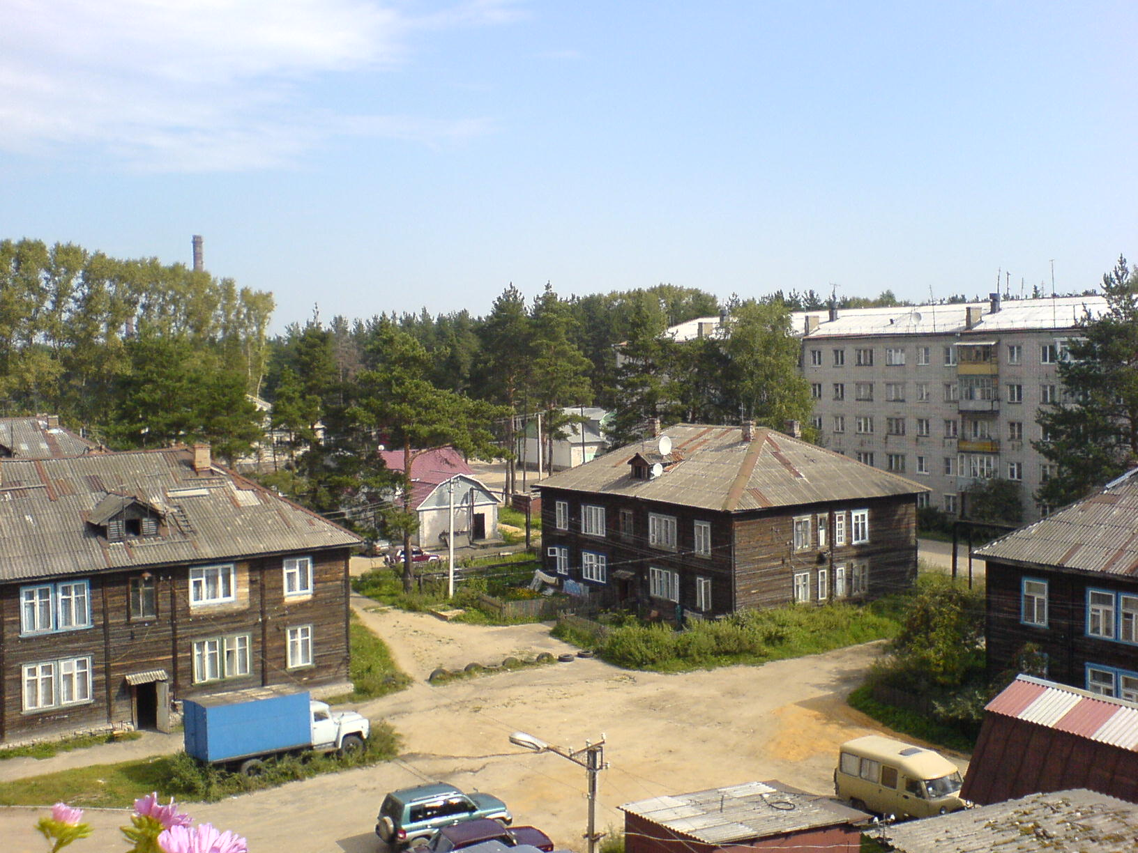 Ул. Садовая